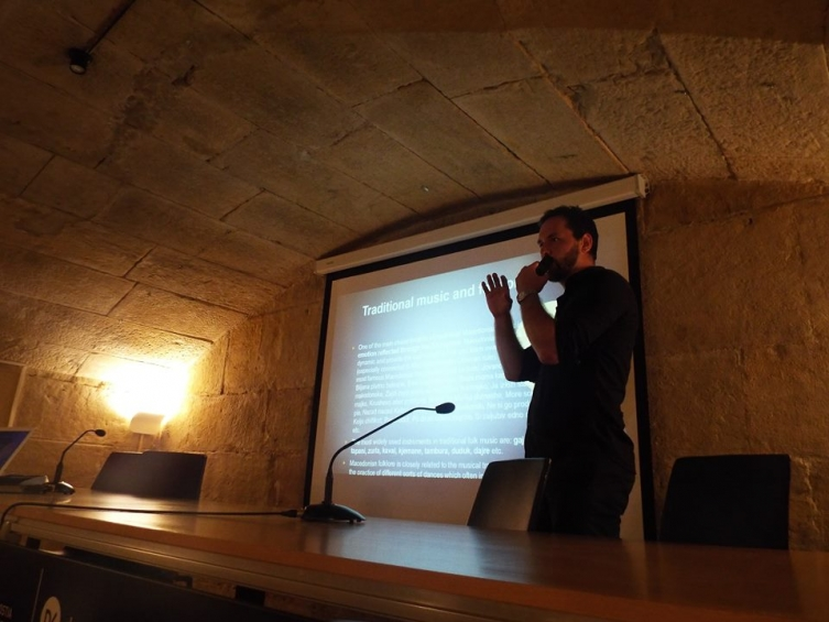 Настап и предавање на Марковски во библиотеката Сан Херонимо во Сан Себастијан, Шпанија (2018)